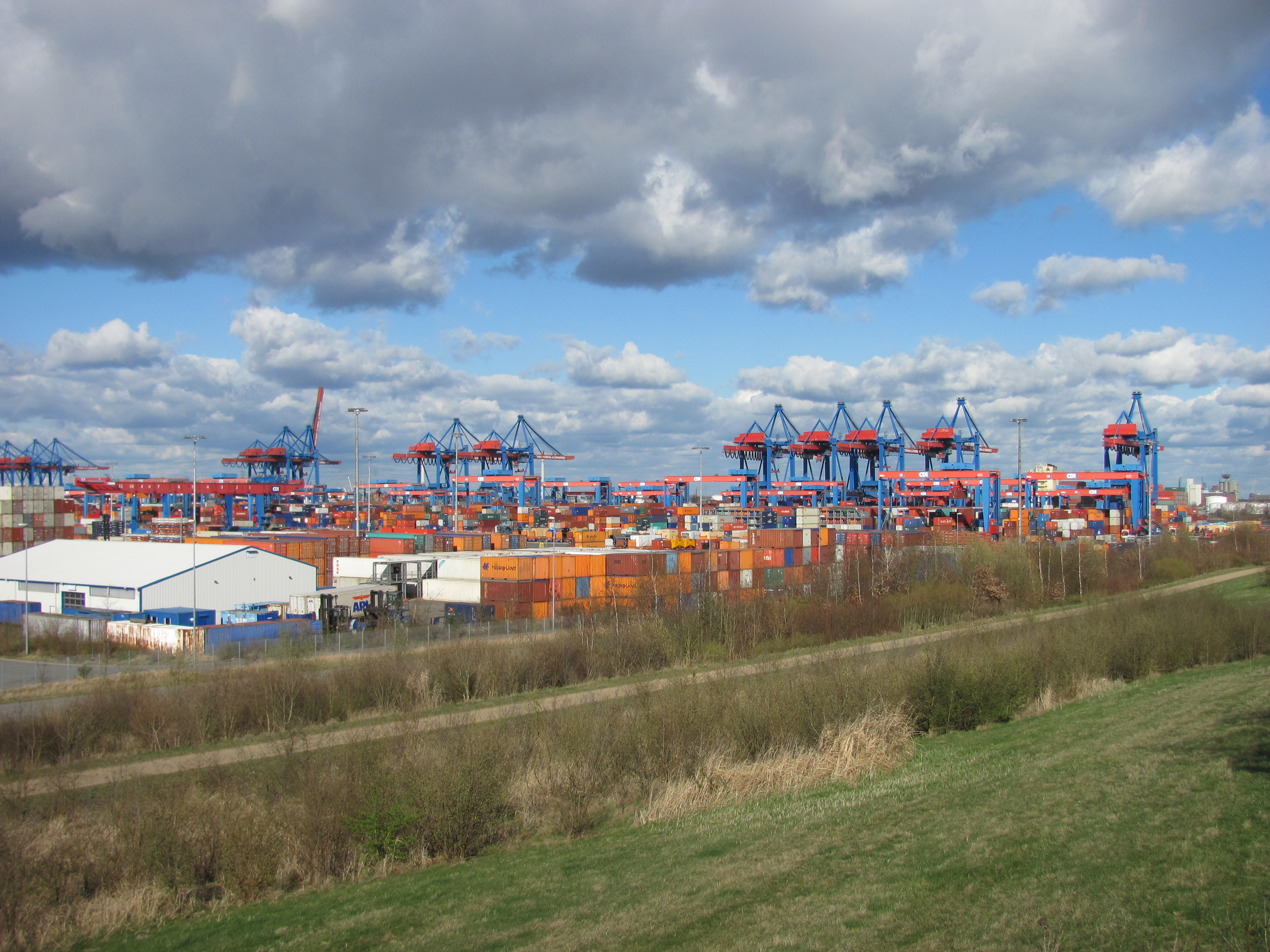 Blick vom Moorburger Berg in Hamburg Richtung Norden auf das Containerterminal Altenwerder